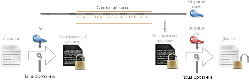 Общая схема